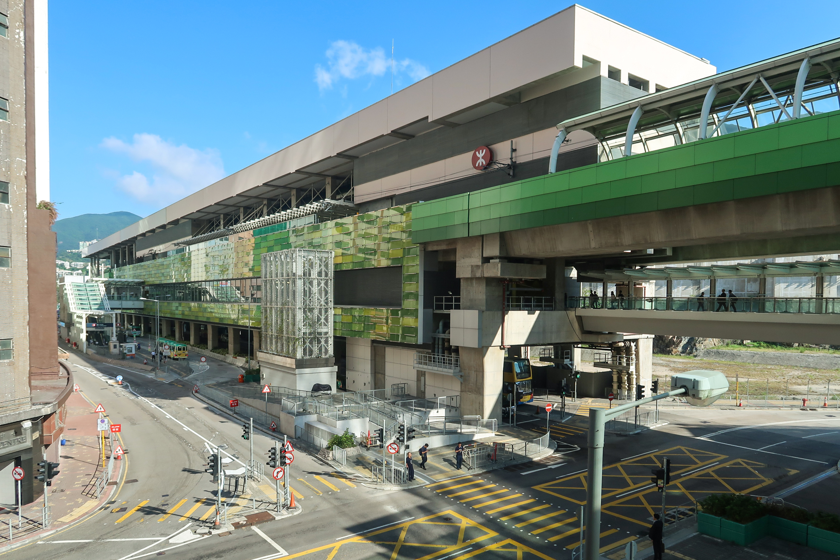 Wong Chuk Hang Station